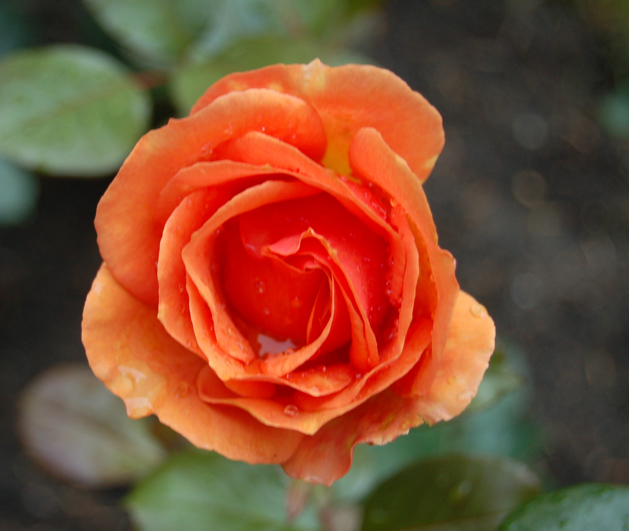 Rosa 'Ashram'